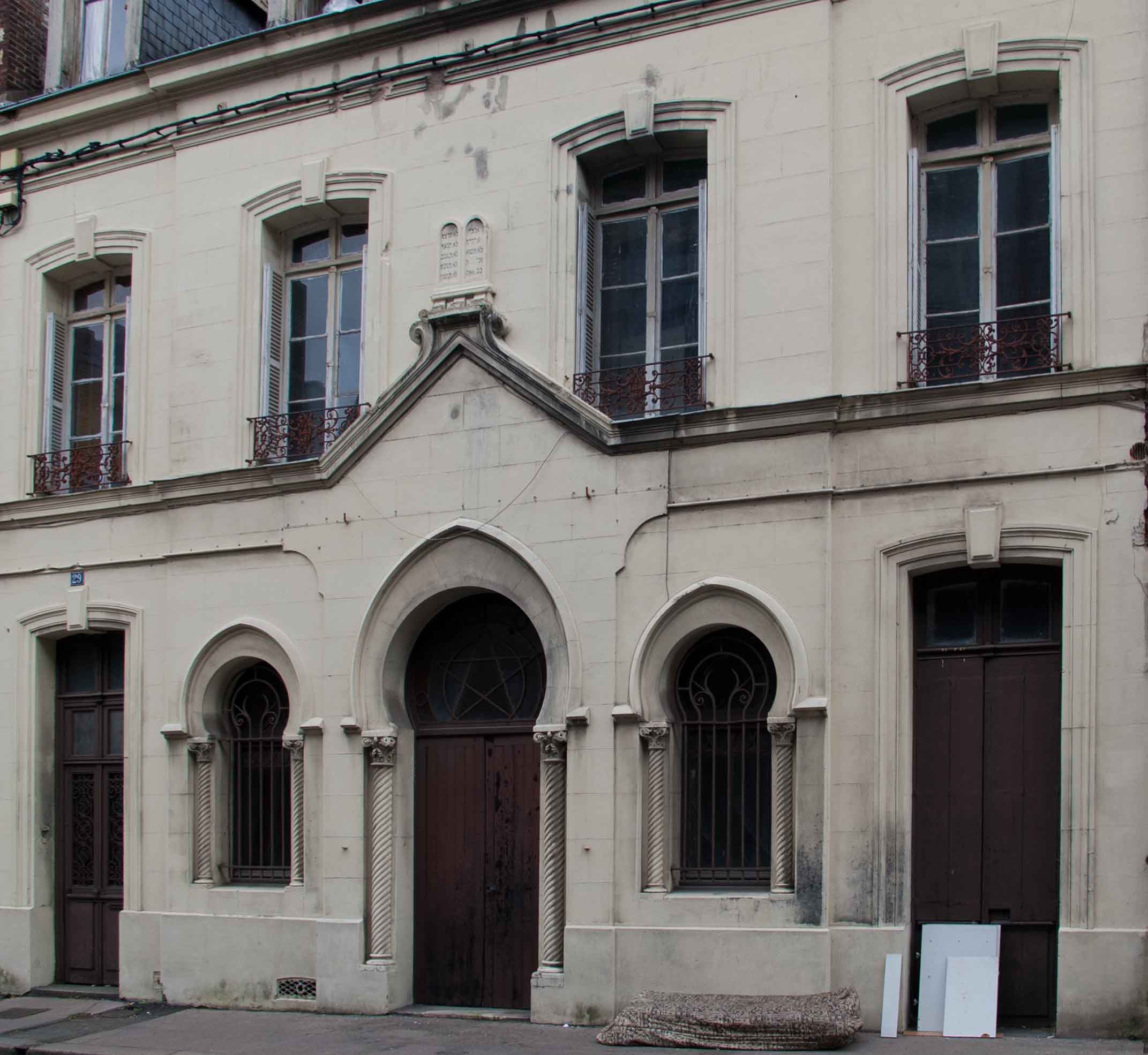 Façade de la synagogue, 29 rue Gremont 76500 ELBEUF